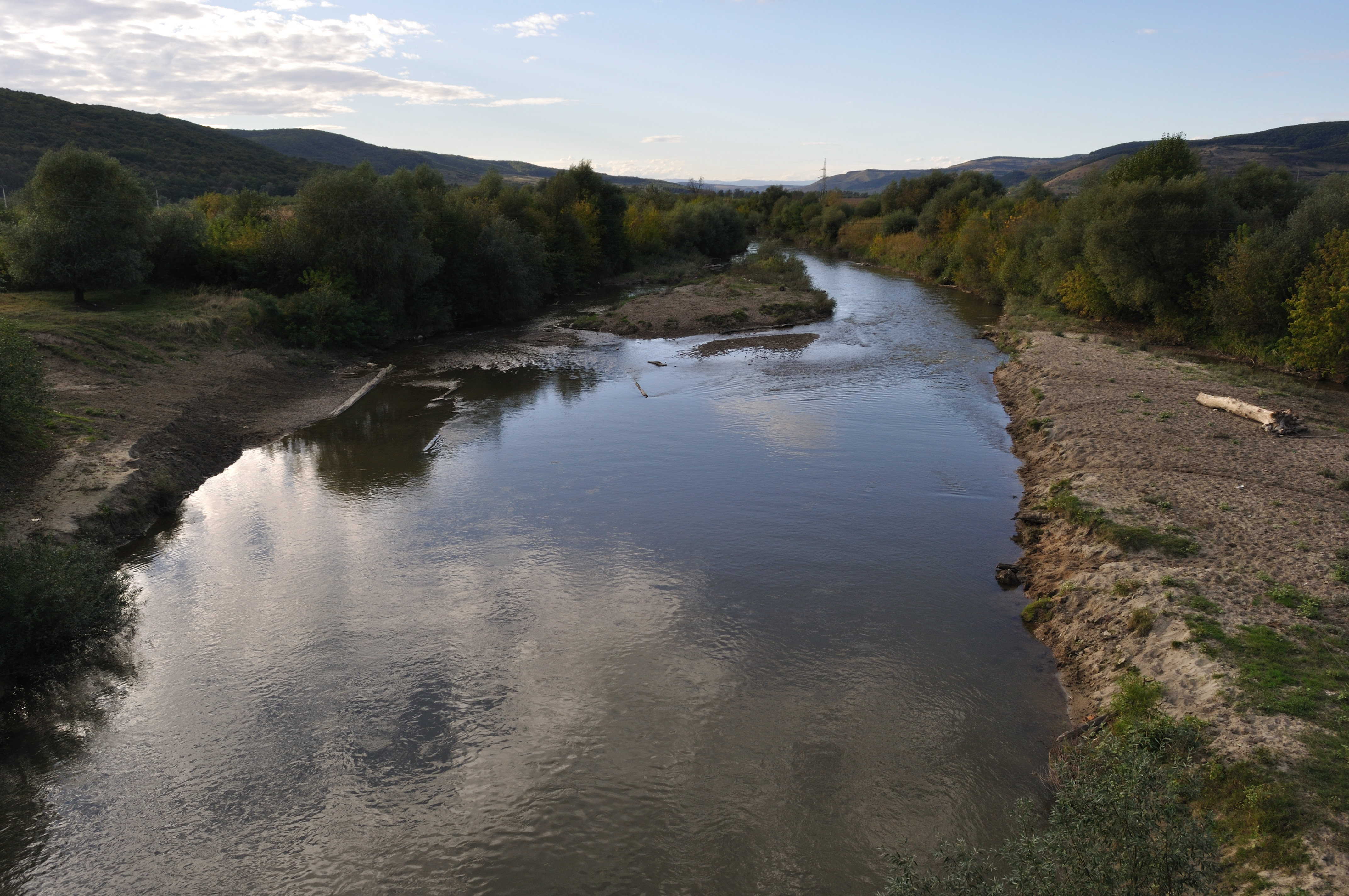 Râul Târnava Mare